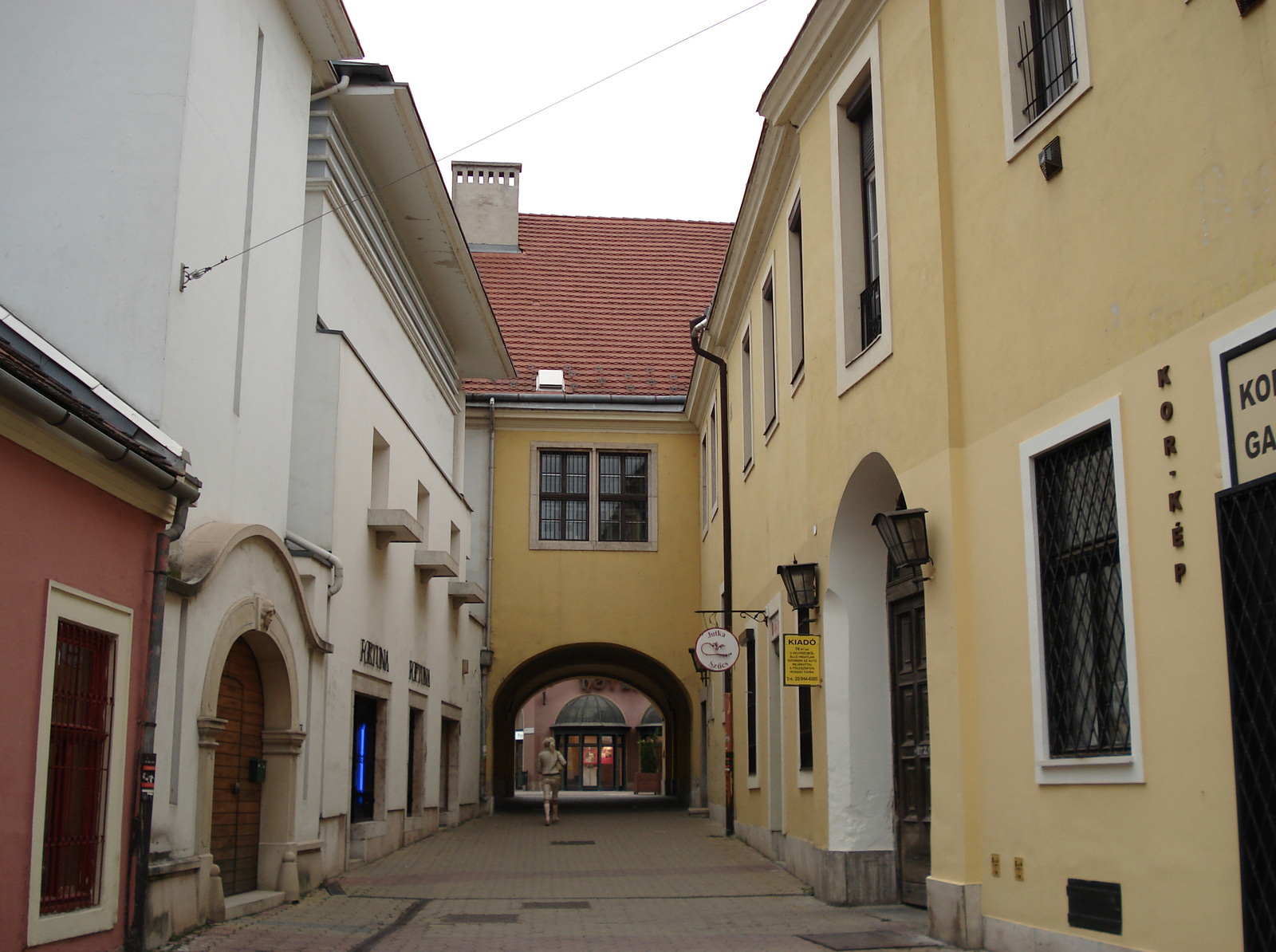 Lakóház (Miskolc, Rákóczi Ferenc utca 2 .)